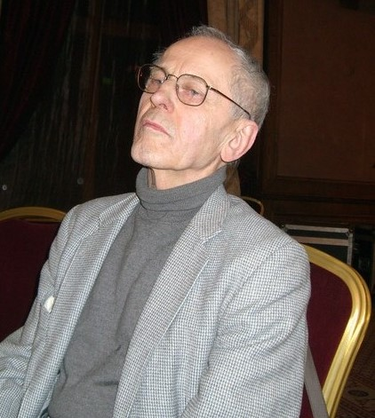 Aloyzas Stasiulevičius - tapytojas, dailės pedagogas, kritikas